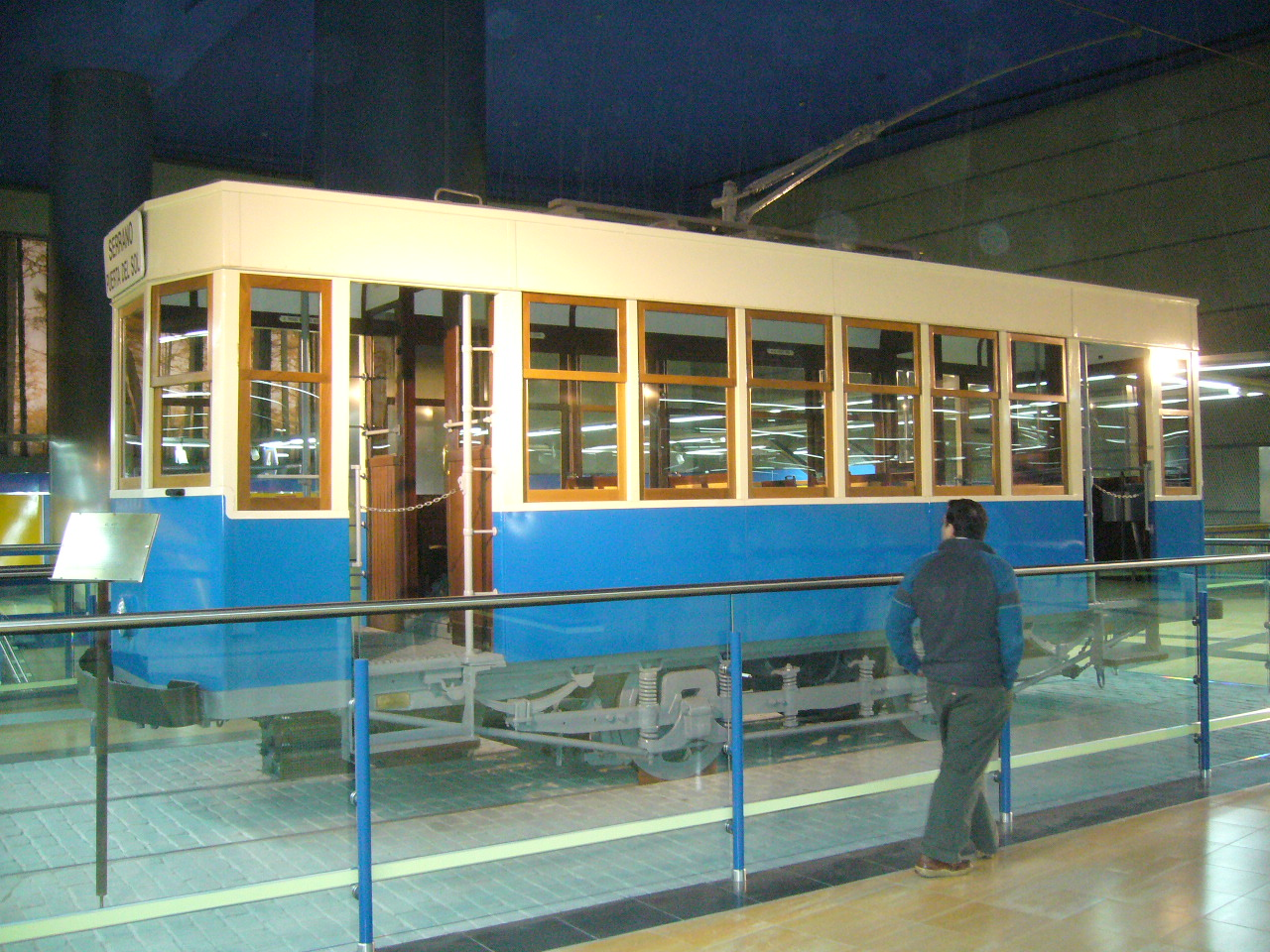 Tranvia de exposicion en la parada de Pinar de Chamartín en la línea 1 y 4 del metro de Madrid. Tramway Pinar de Chamartin station at lines 1 and 4 in Madrid metro